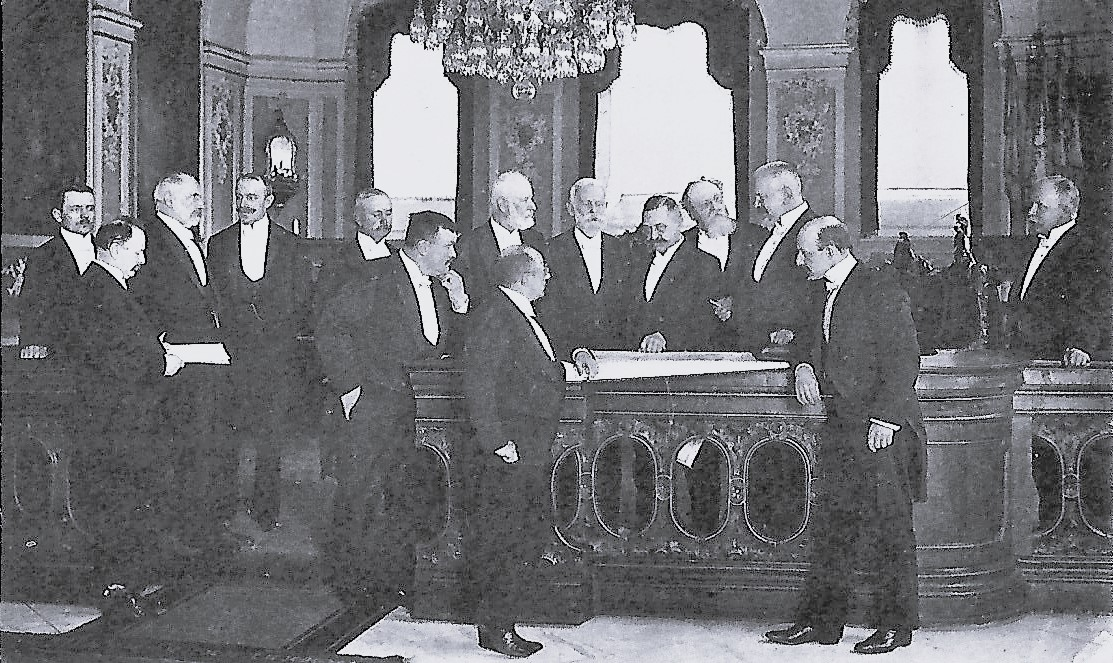 Lübeck- Vor Beginn einer Senatssitzung. Von Links:Kalkbrenner, Lienau, Fehling, Vermehren, Rabe, Neumann, Kuhlenkamp, Ewers, Eschenburg, Strack, Stooß, Eschenburg, Possehl, Evers